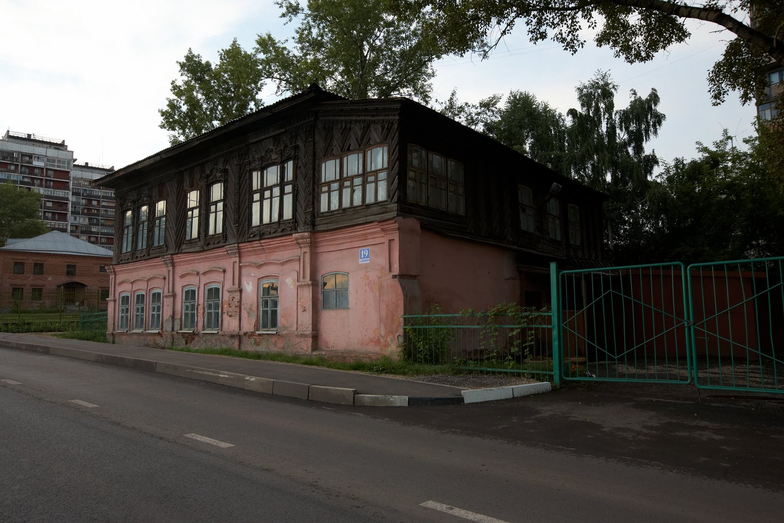 Novokuznetsk